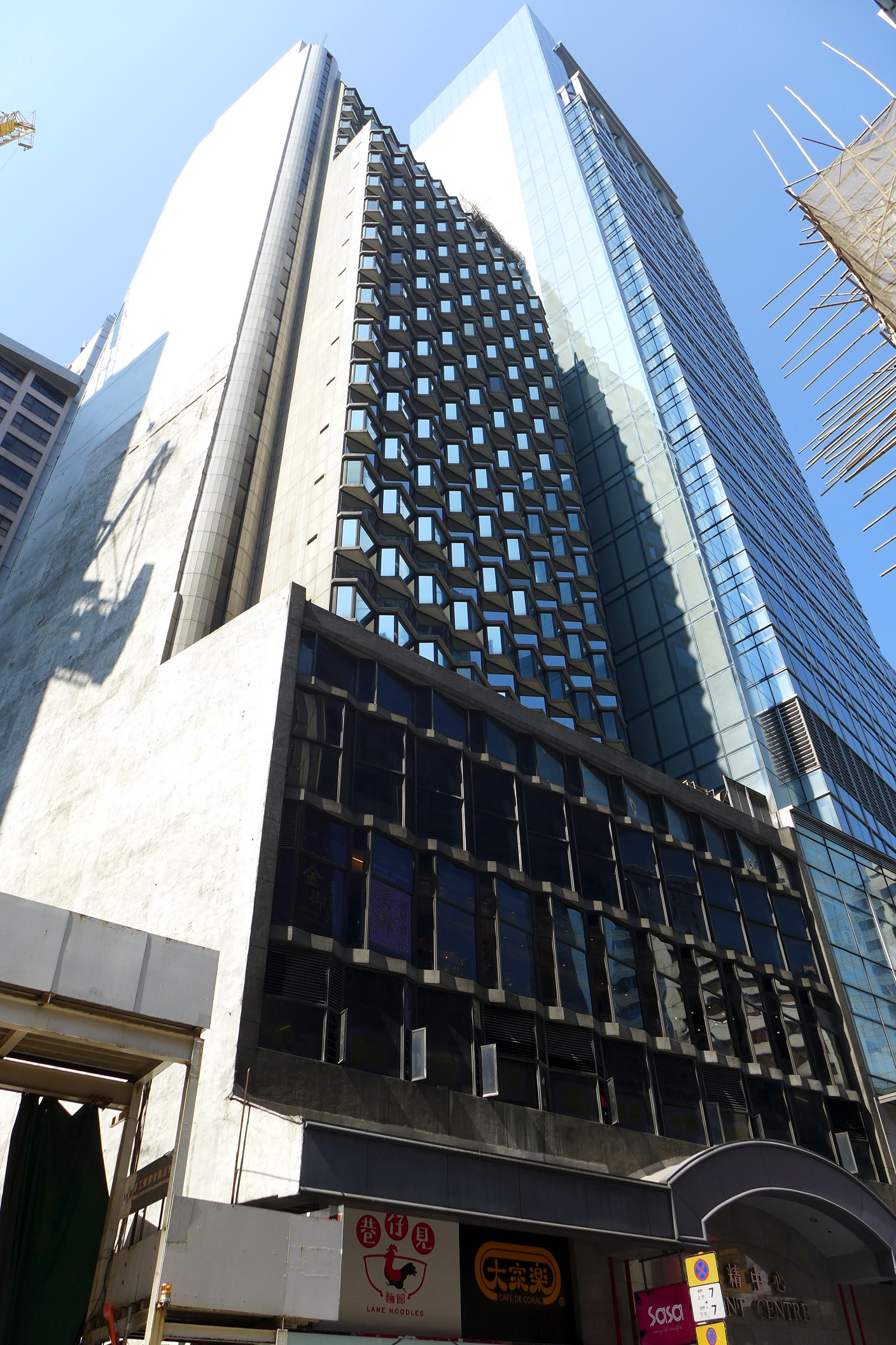 Regent Centre, Central